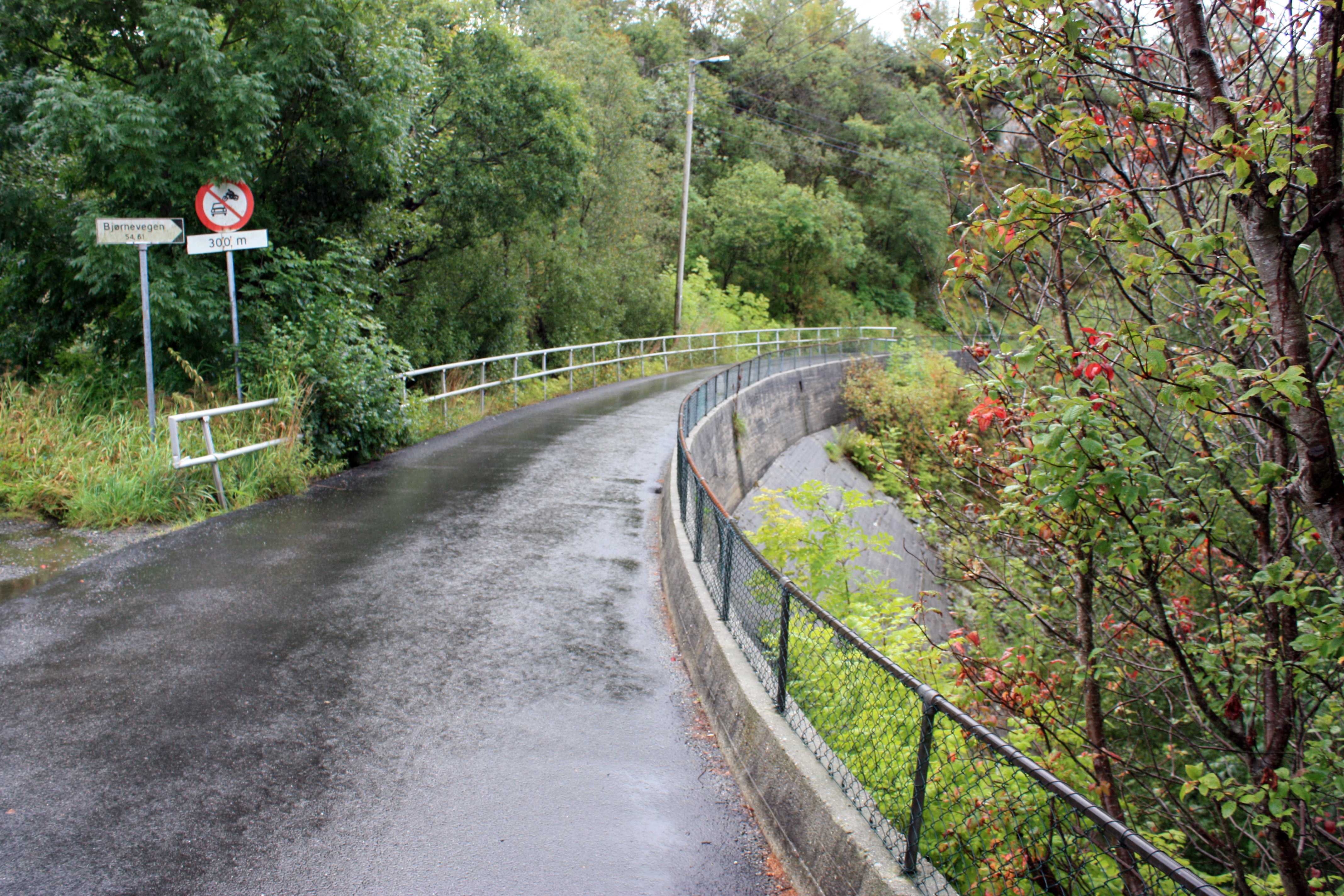 Bjørnevegen, Bergen. Part of the old Nesteun-Osbanen.